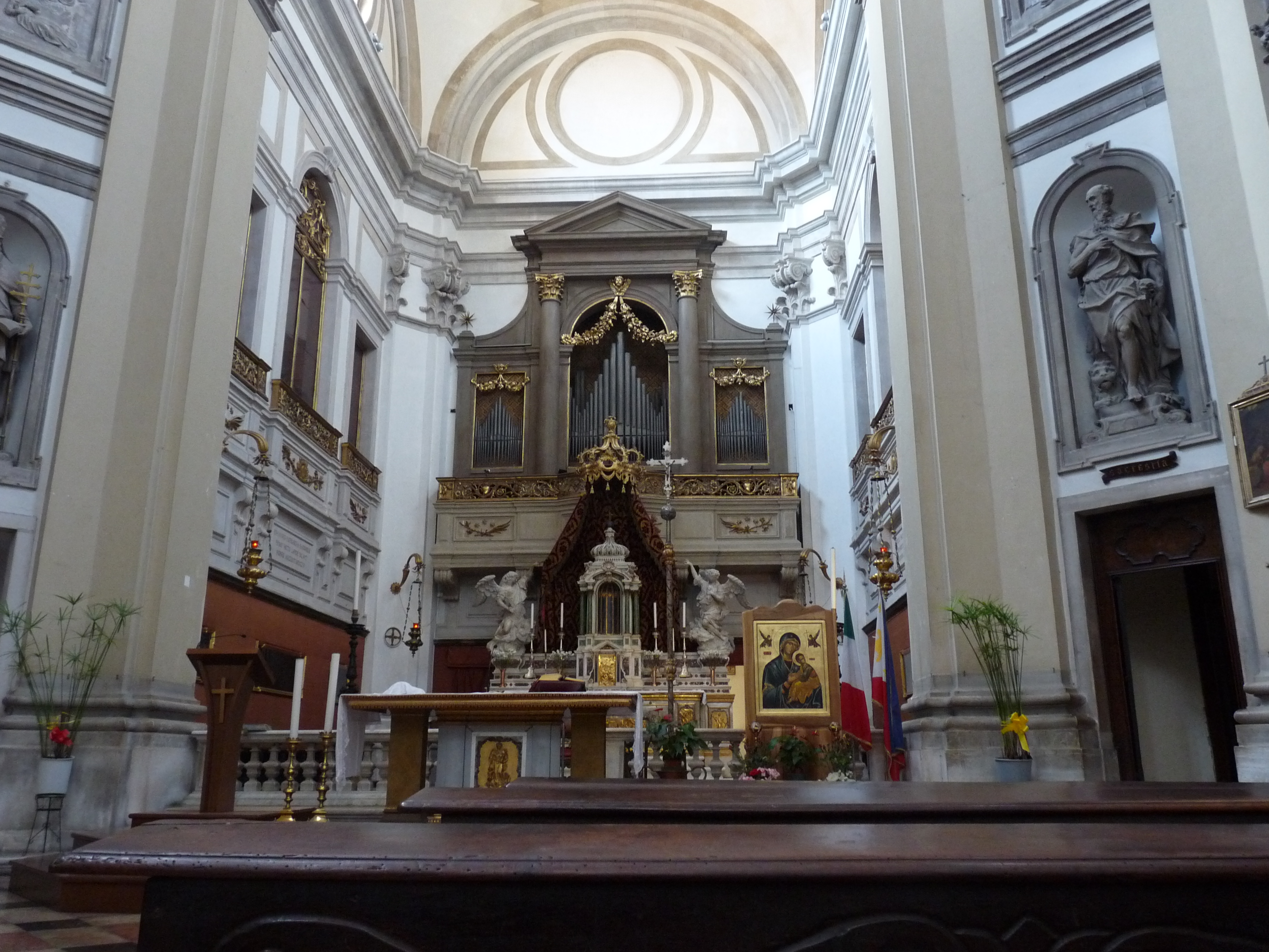 Venice (Italy): Church of Santa Maria della Fava (Consolazione): Inside